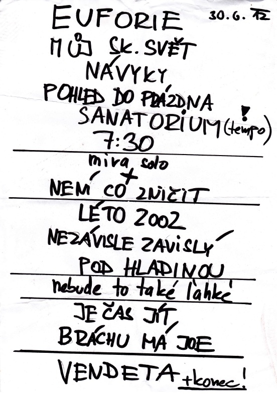 Playlist kapely DOvolena Narkotika z koncertu v Karolince, 2012.